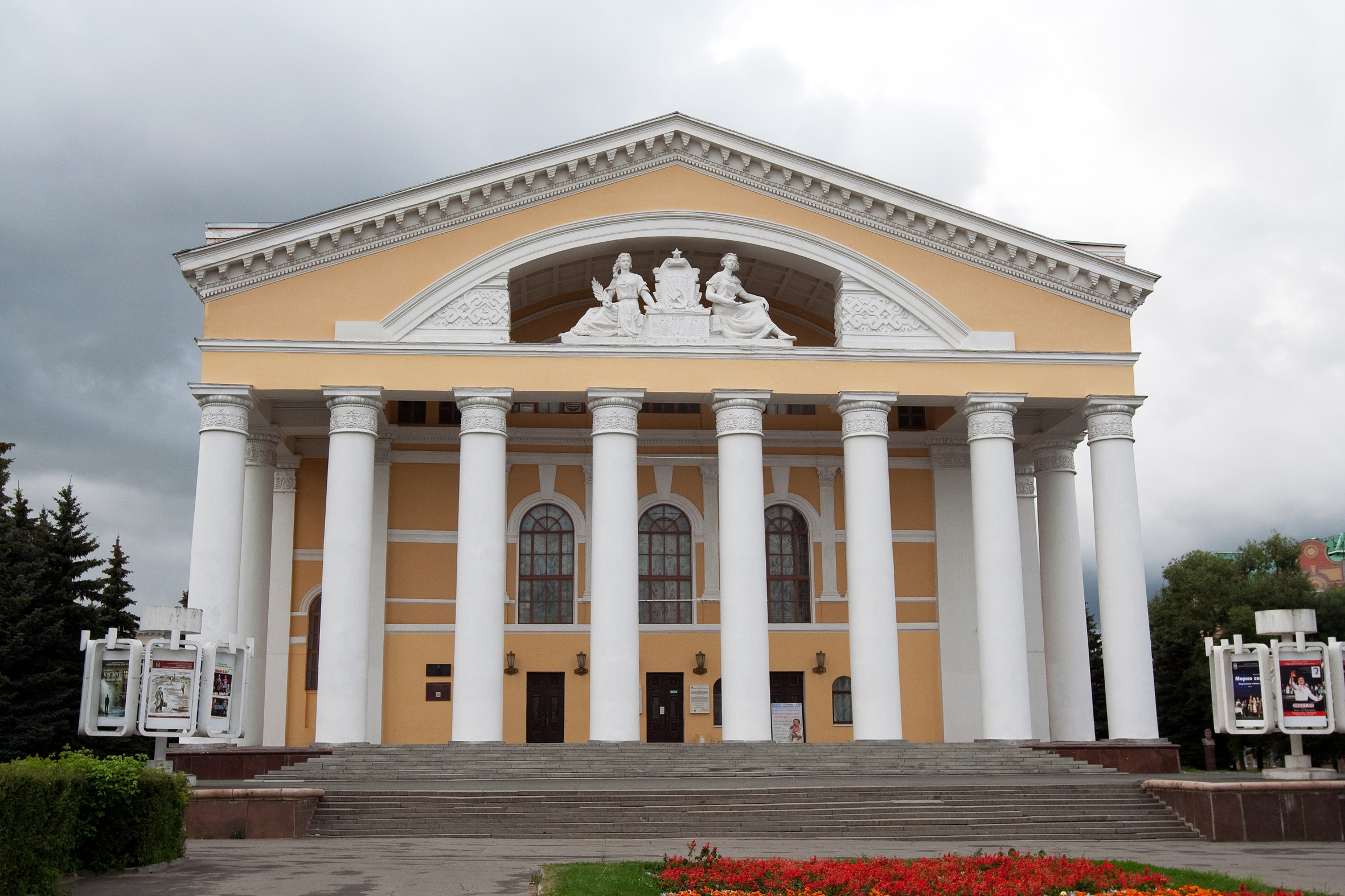 Театр марийский драматический: площадь Ленина, 2, Йошкар-Ола, Марий Эл